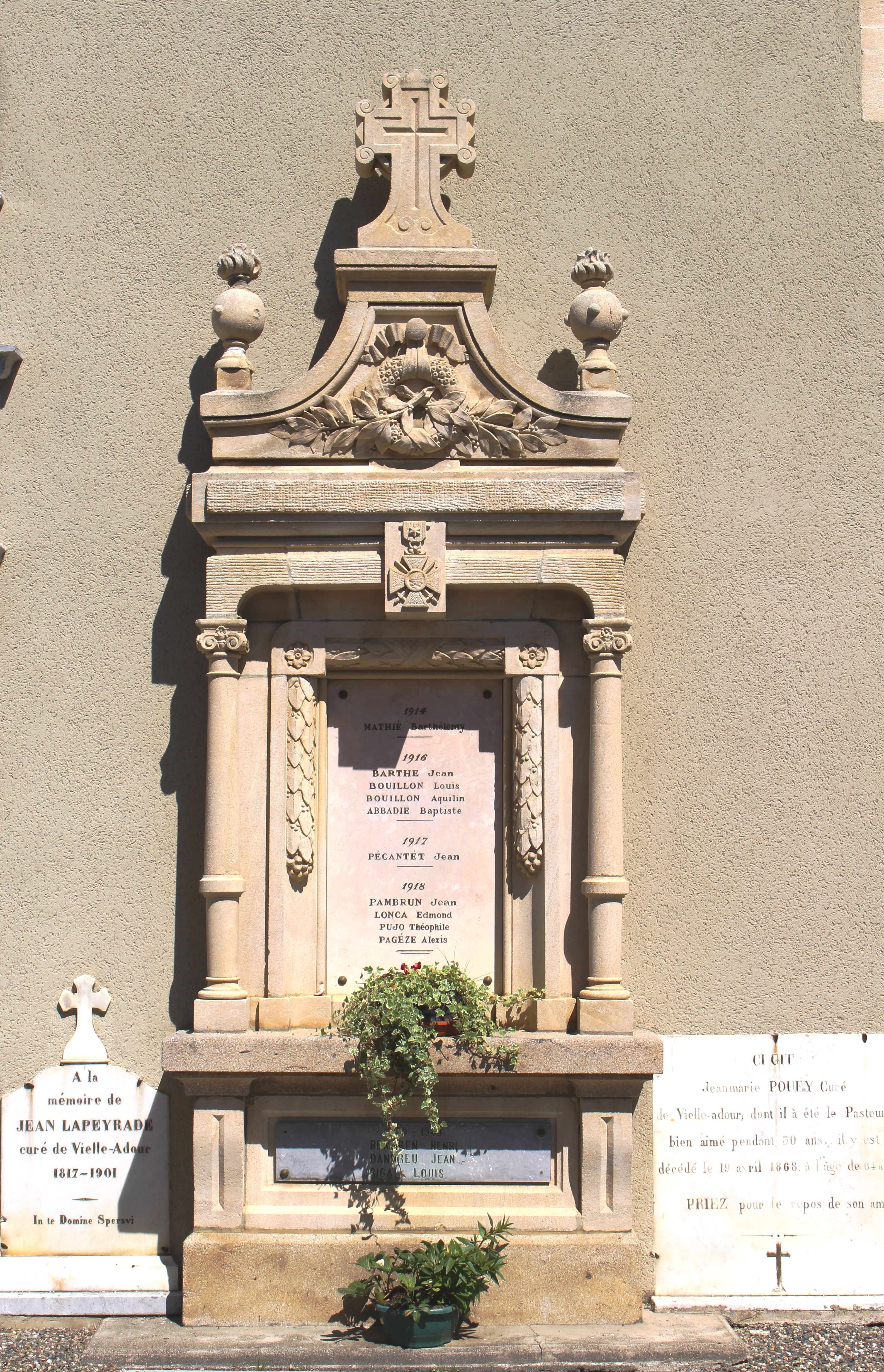 Monument aux morts de Vielle-Adour (Hautes-Pyrénées)